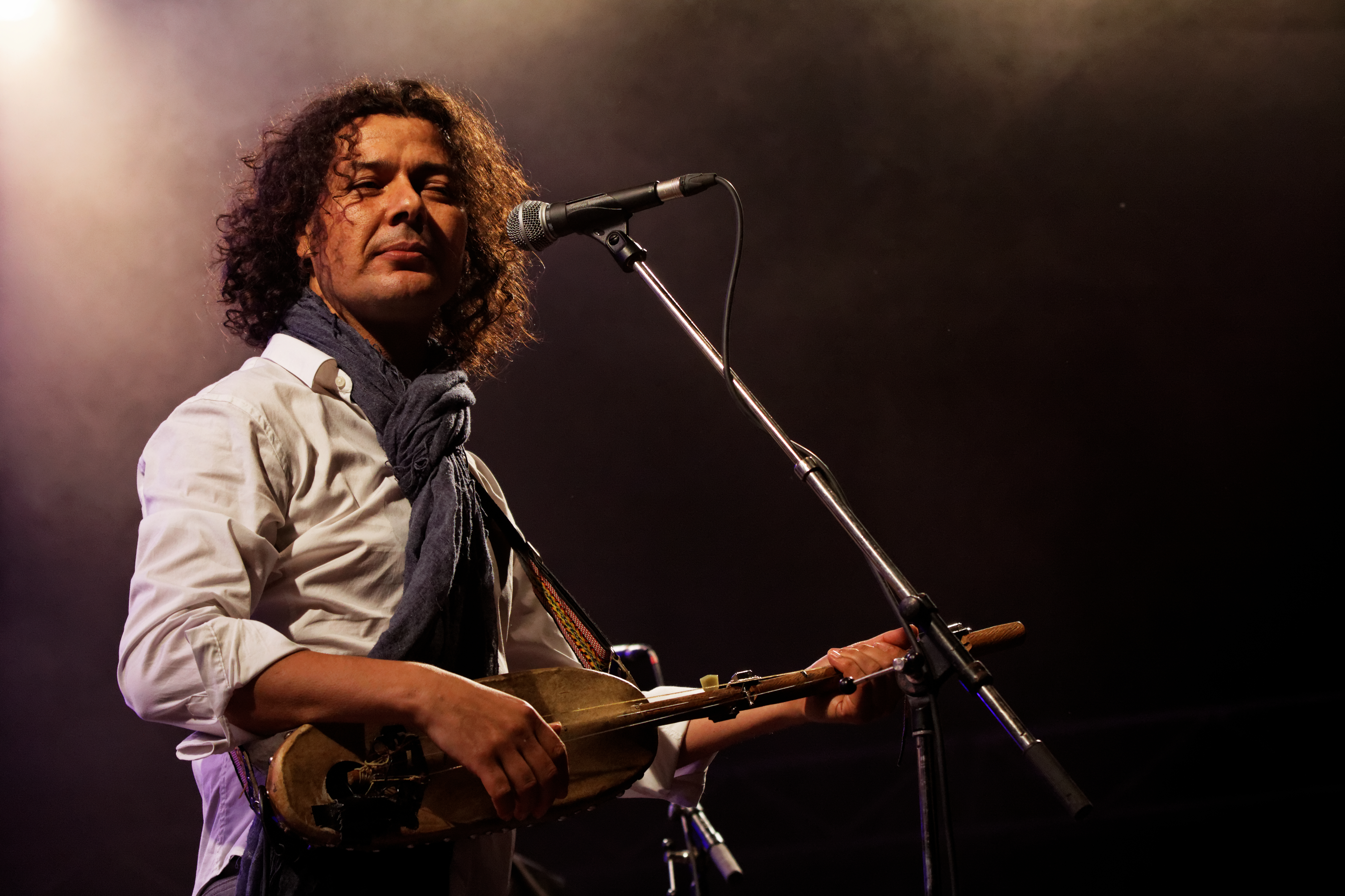 Aziz Sahmaoui & University of Gnawa en concert sur la scène Kermarrec lors du Festival du Bout du Monde à Crozon dans le Finistère (France).